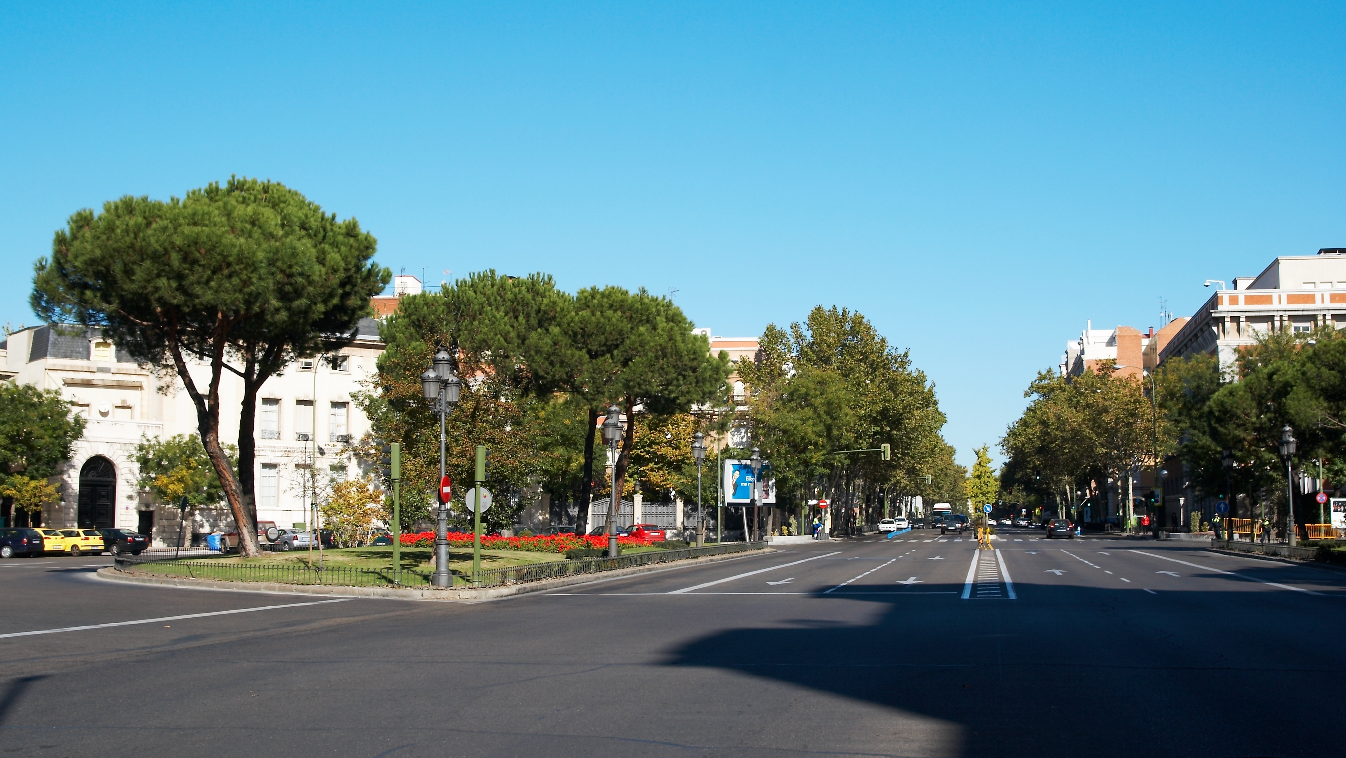 Plaza del Marqués de Salamanca y calle Príncipe de Vergara, Madrid.